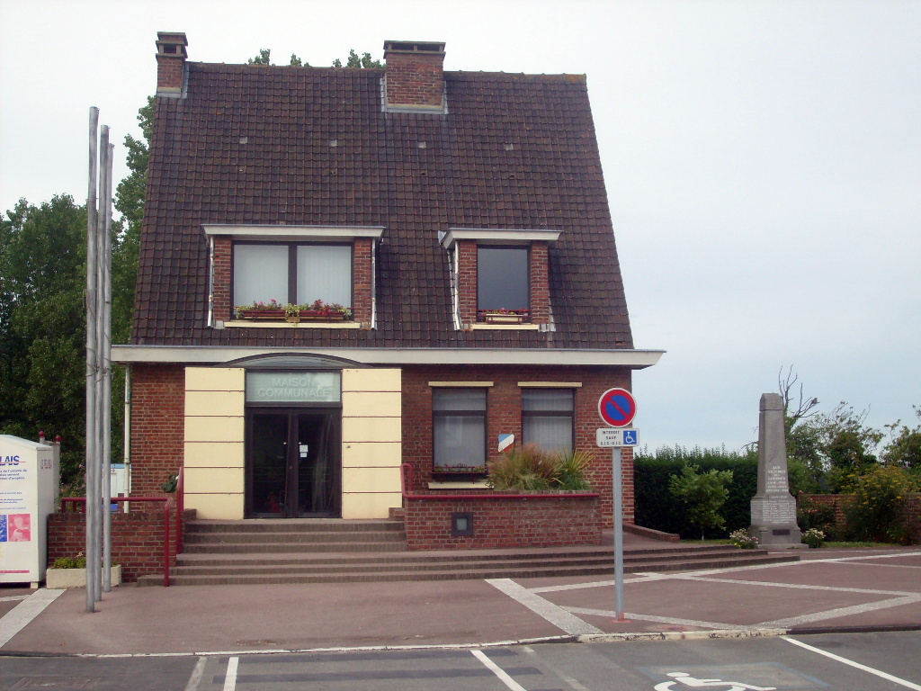 Mairie de Zuydcoote